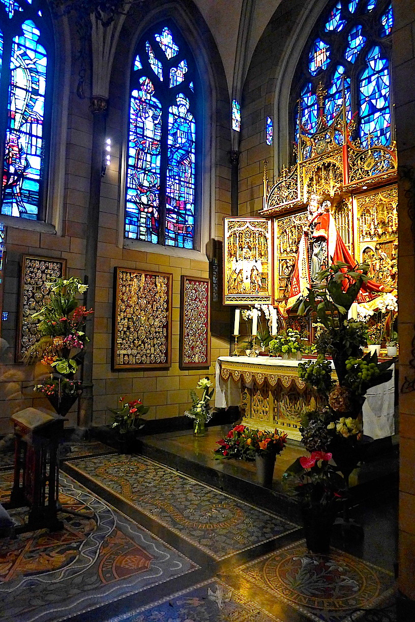 Часовня чудотворного образа церкви Девы Марии, Маастрихт, Нидерланды.